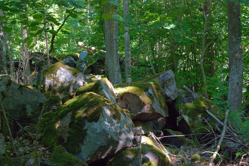 Bjärkaholm på Bosudde i Stångån. Lämningar av muren.